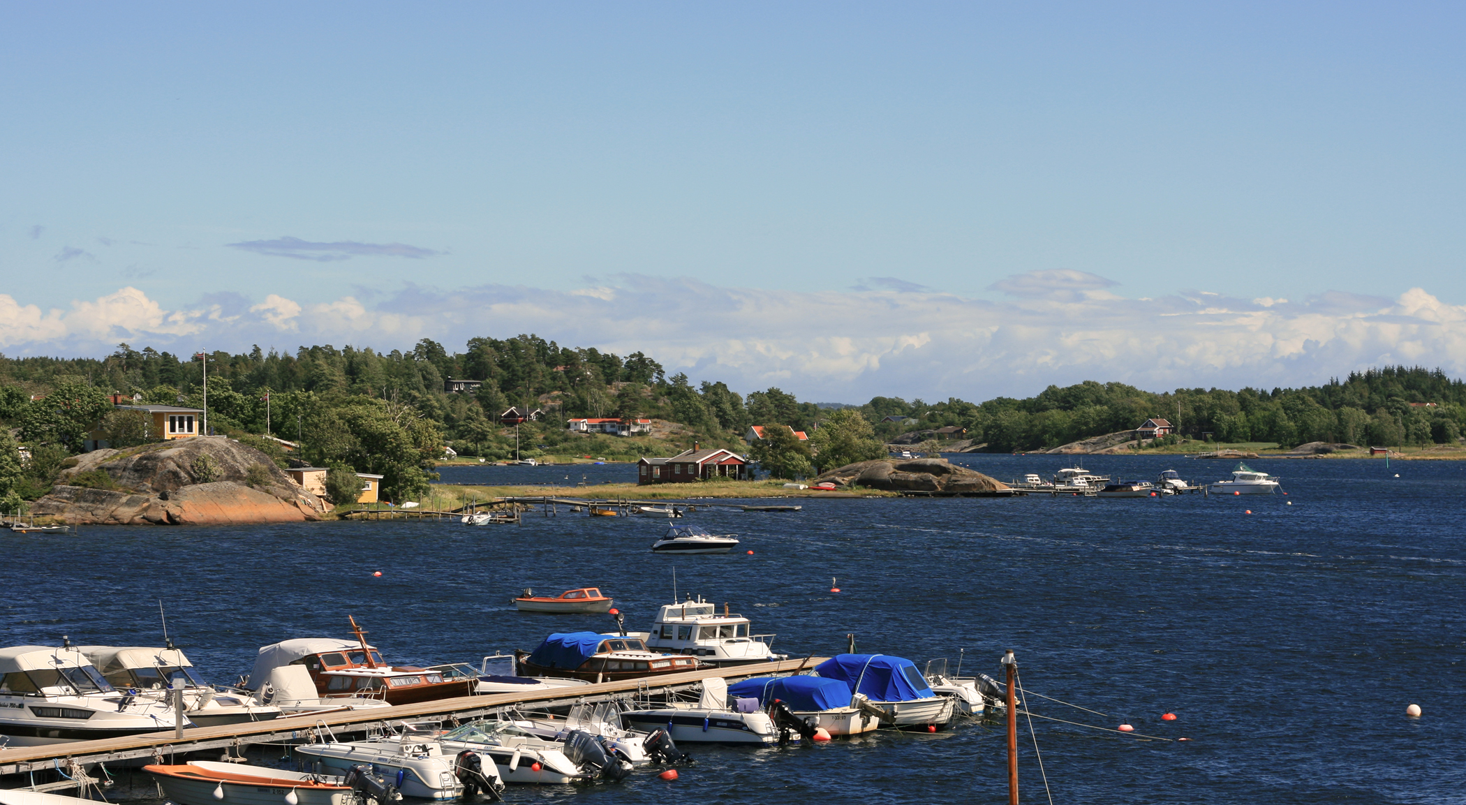 Viksfjord, Larvik, Norway.